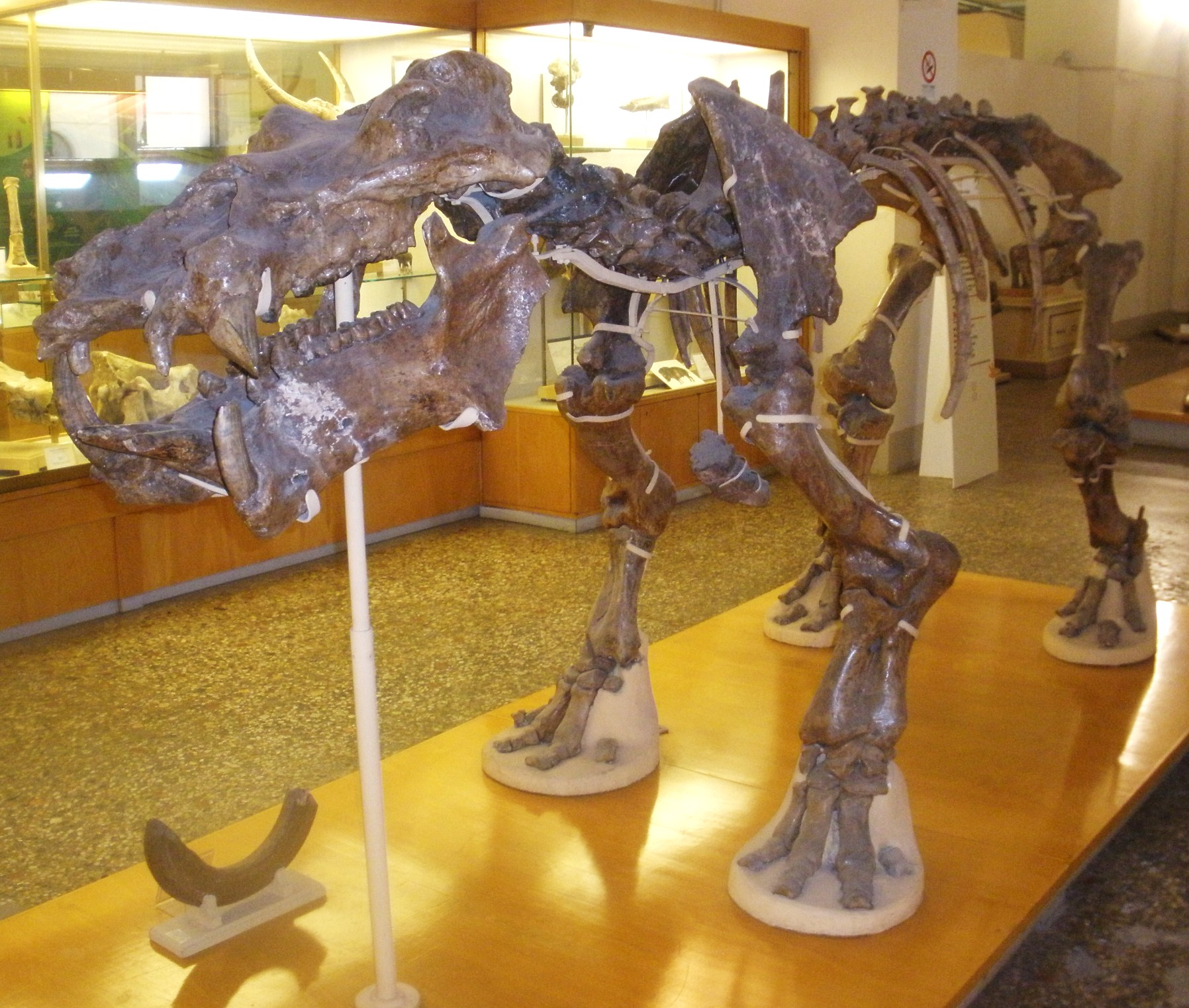 Fossil of Hippopotamus, an extinct mammal- Took the picture at Museo di Paleontologia di Firenze